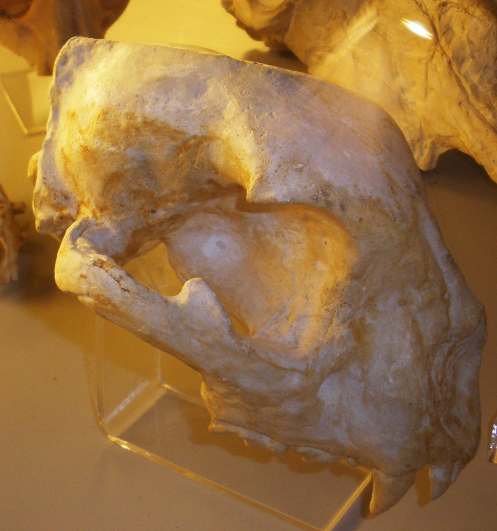 Fossil of Acinonyx pardinensis, an extinct mammal - Took the picture at Museo Paleontologico di Firenze